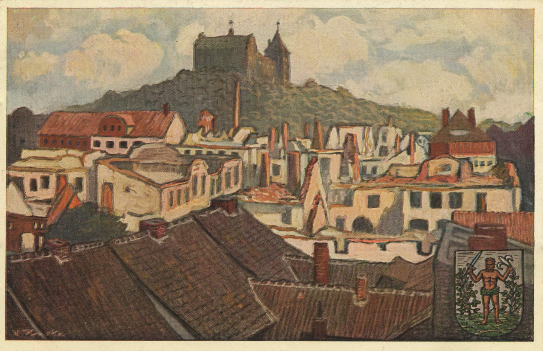 Ordensschloss und Trümmer